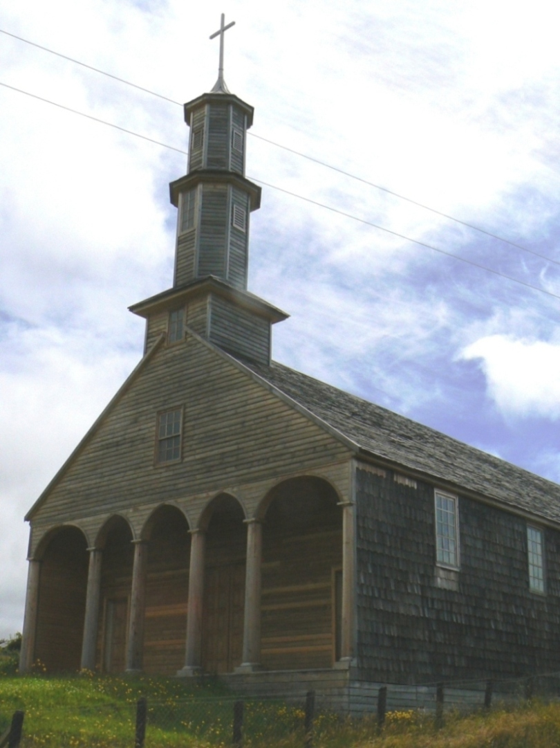 Fachada de la Iglesia de Vilupulli, comuna de Chonchi, Chiloé (Chile)